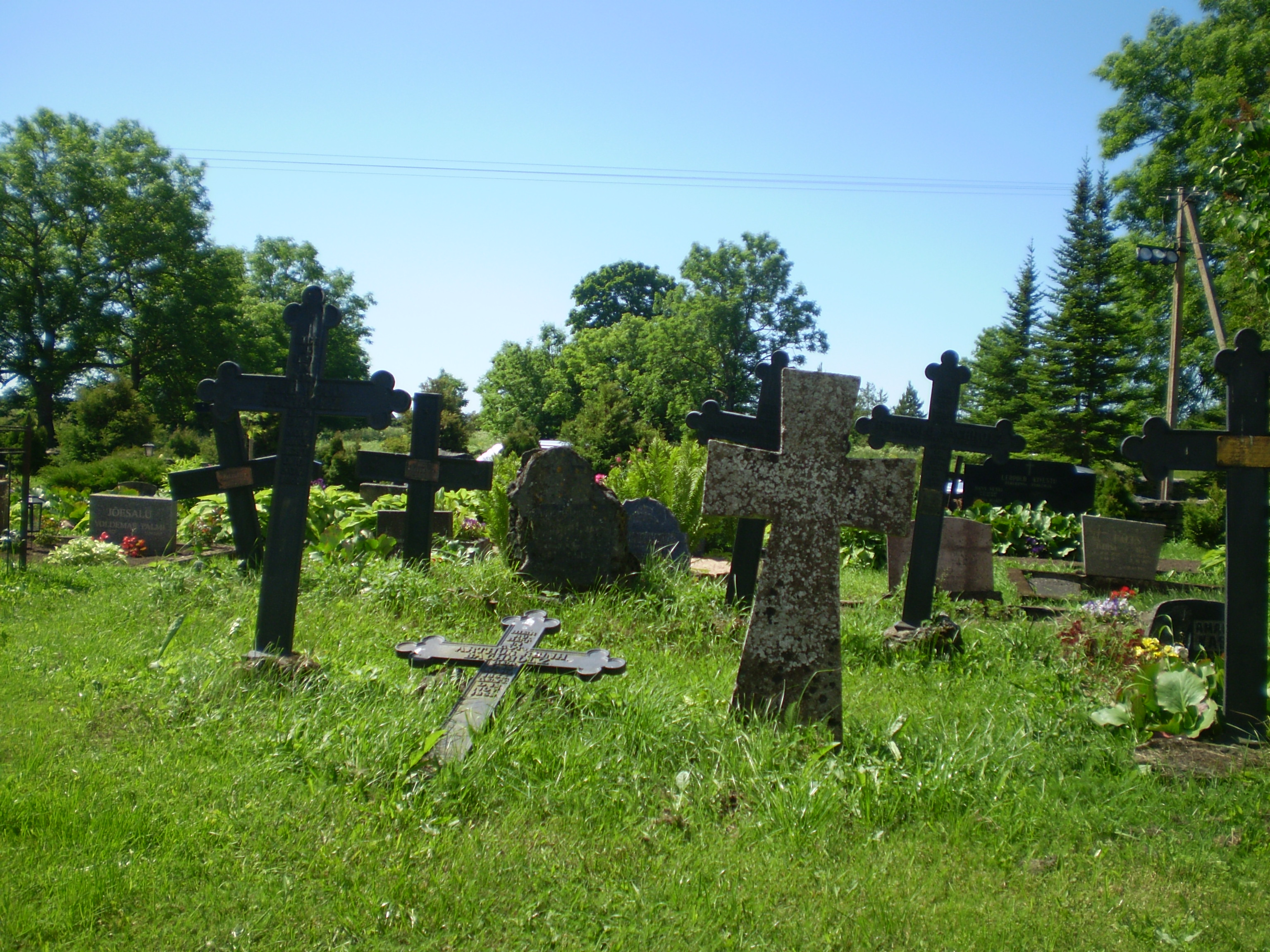 Jõelähtme kirikuaed 14.-20. saj